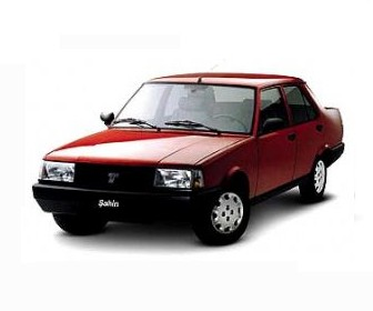 سيارة شاهين المصرية